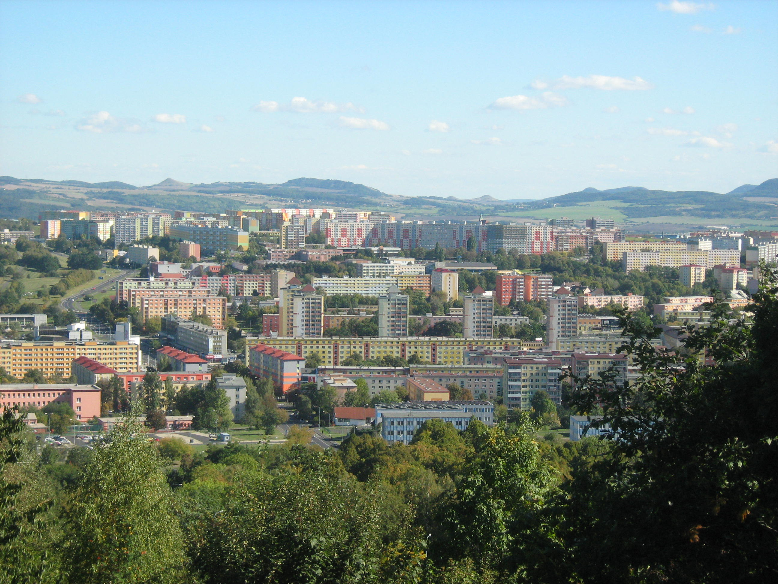 Pohled na Most z vrchu Ressl - 28. 9. 2015